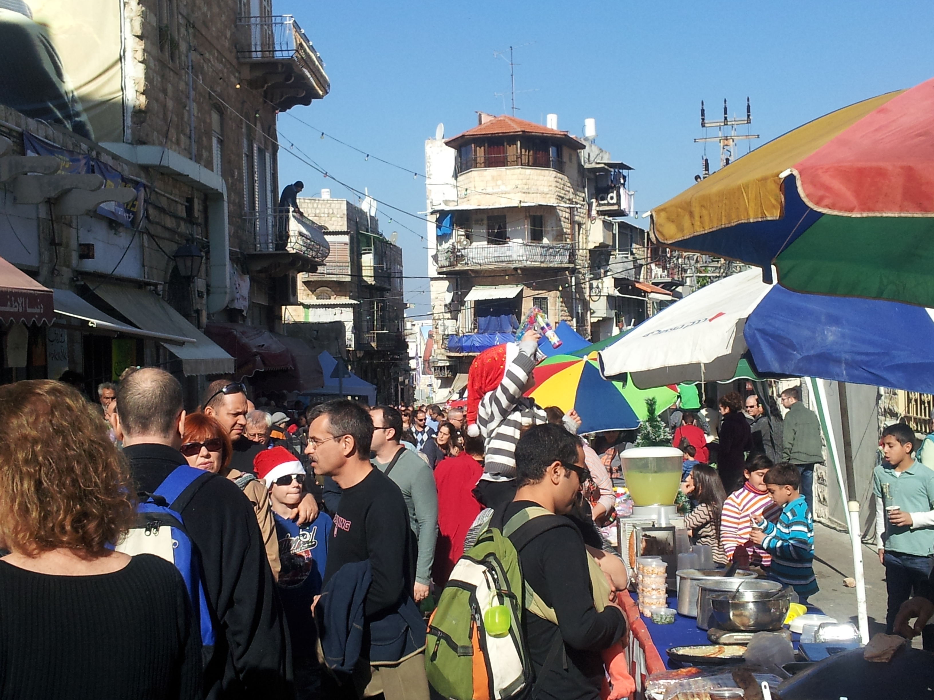 ואדי ניסנאס, במהלך פסטיבל החג של החגים ה-20, 2013